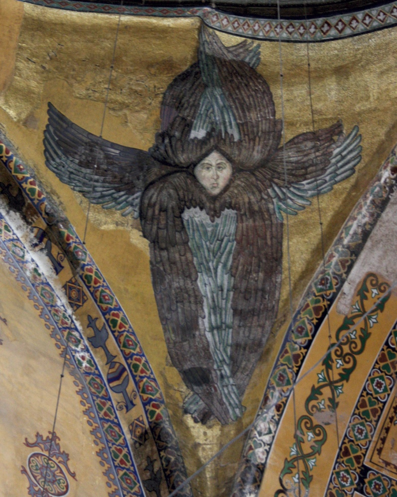 Hagia Sophia: Einer der Erzengel in den Pendentifs hat wieder ein Gesicht (Das Ornament wurde im Zuge der Kulturhauptstadt 2010 entfernt)